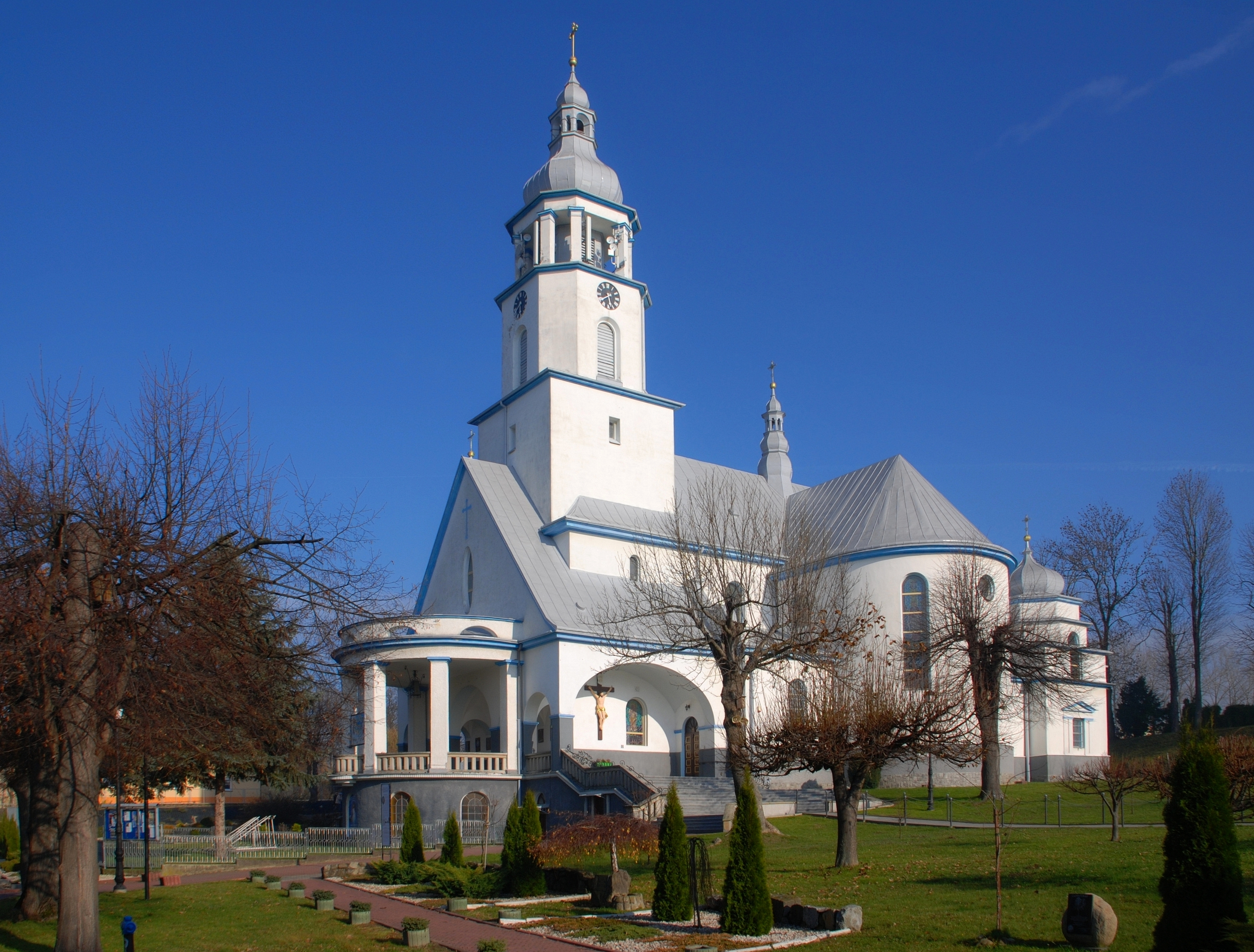 wieś Tarnowiec (województwo podkarpackie)